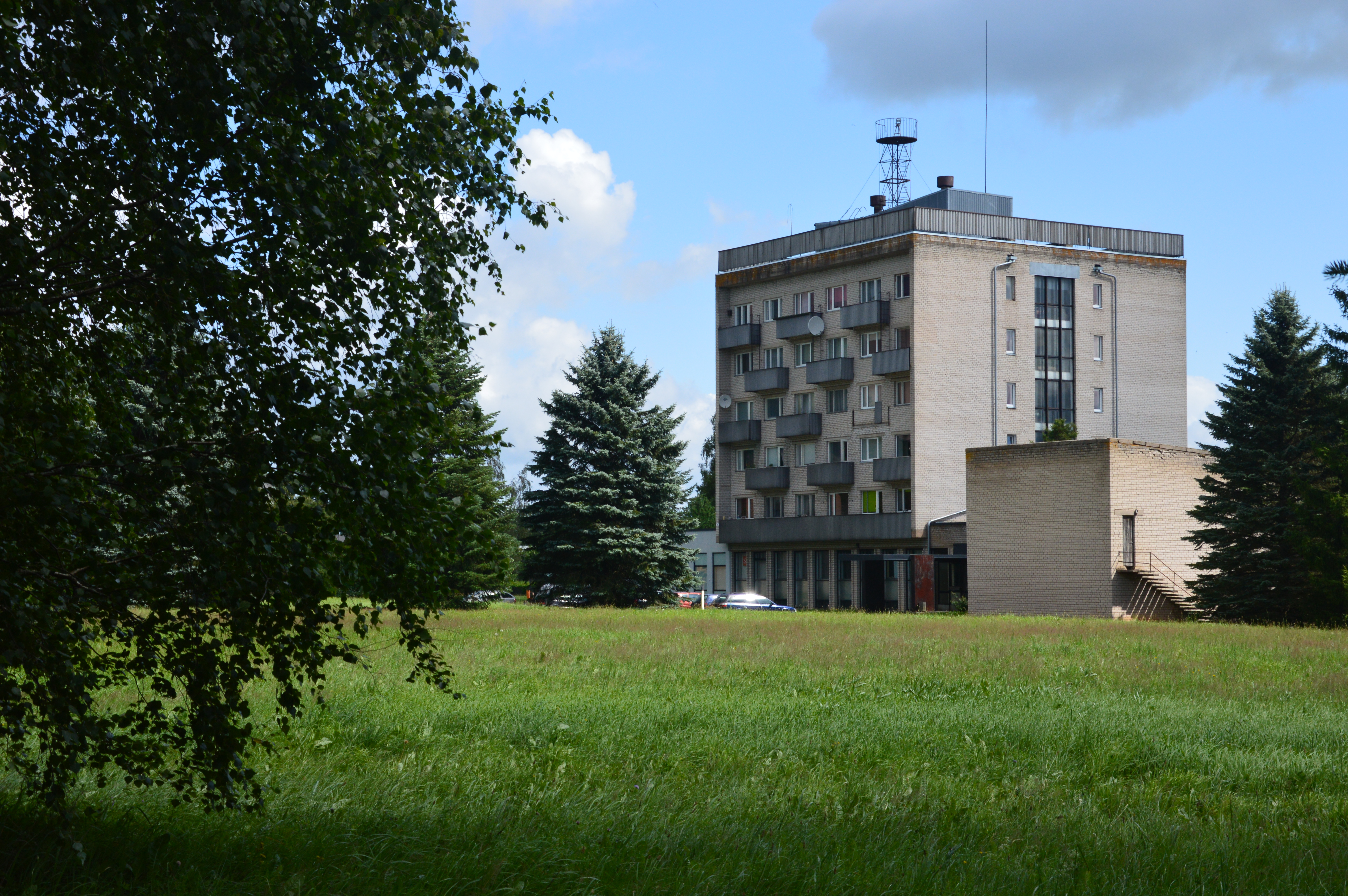 Tõravere.